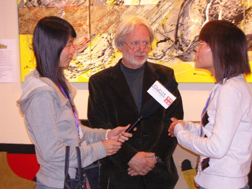 L'artiste Yves Lagraulet interrogé par la presse locale lors de la 12ème exposition d'art internationale de Canton